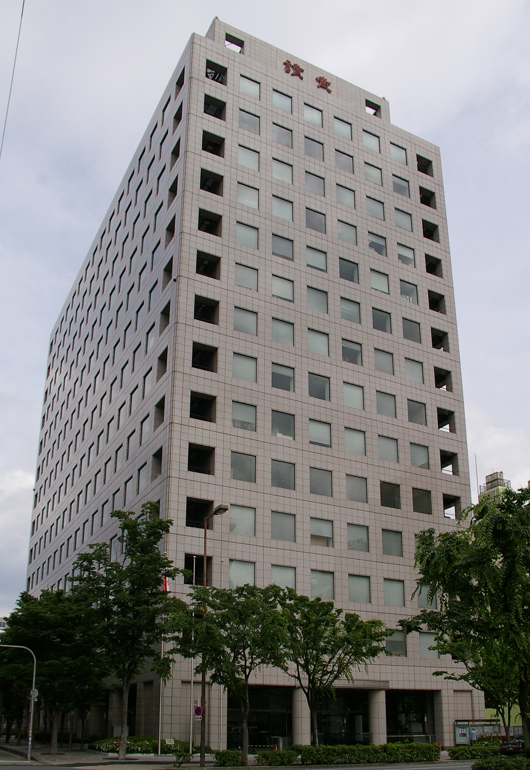 Photograph of Osaka Yomiuri Building in Kita-ku, Osaka, Osaka Prefecture, Japan.